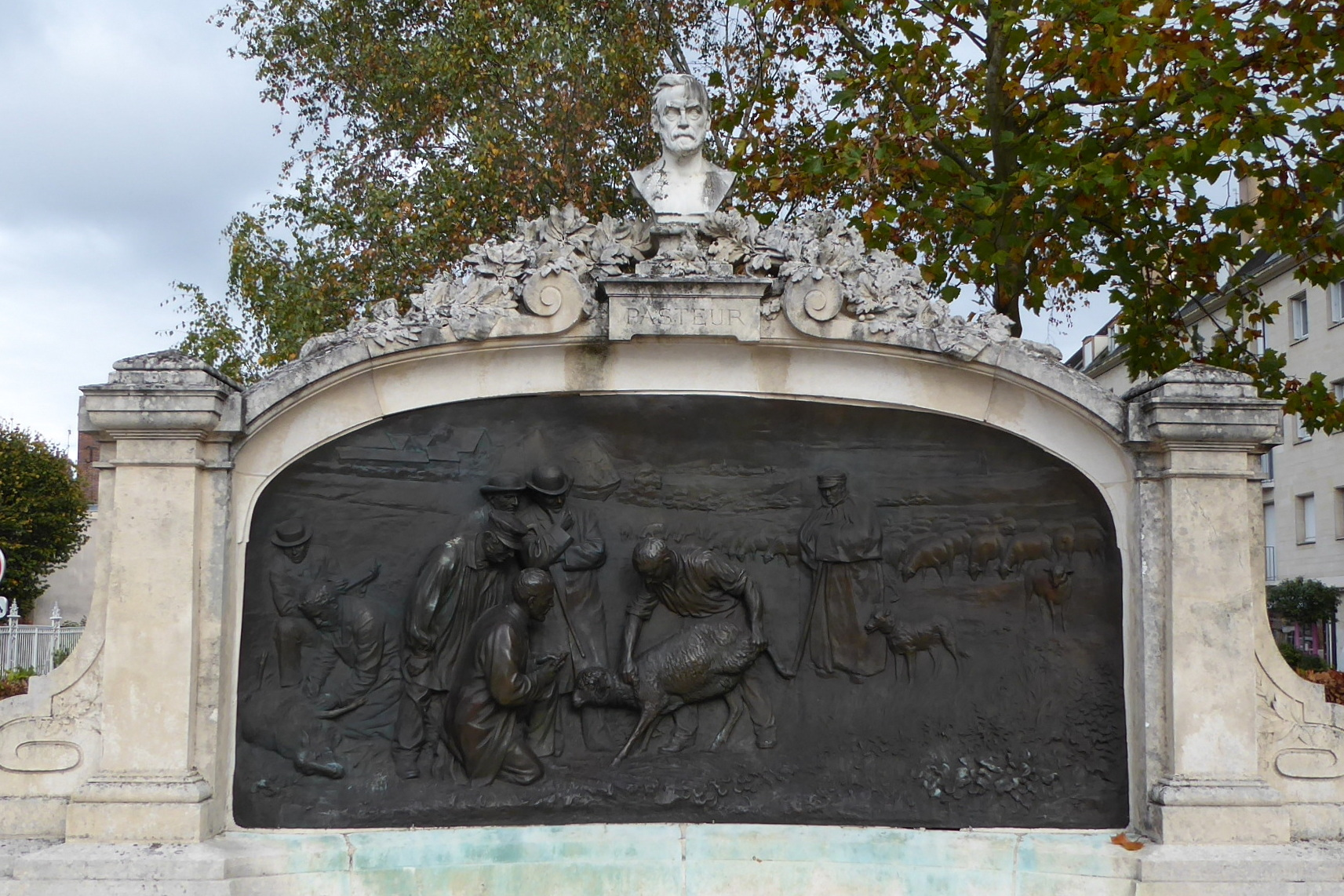 Monument Pasteur, rues Georges Fessard et Charles Brune, Chartres, Eure-et-Loir (France). .